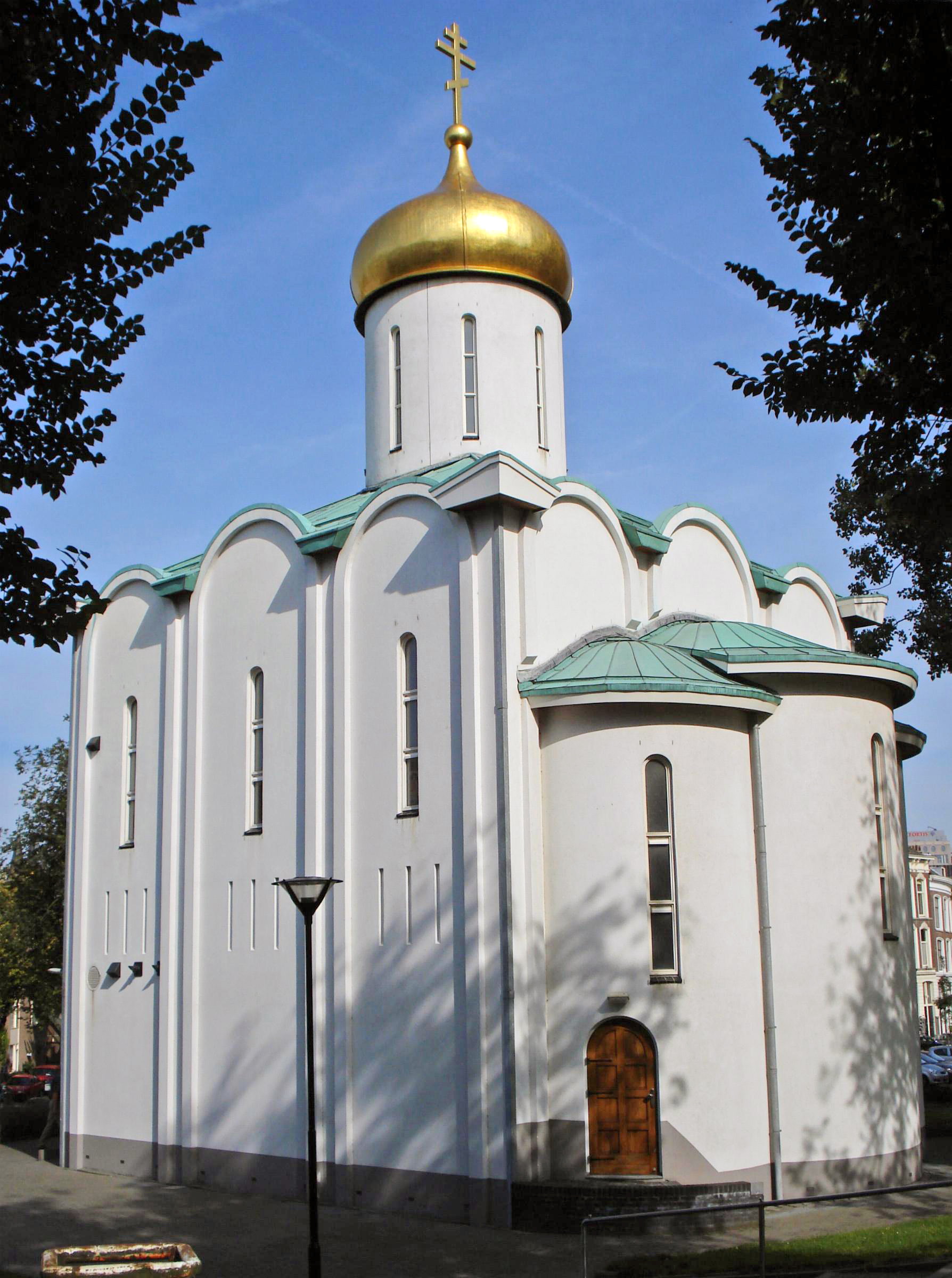 Rotterdam, Westzeedijk. Russische kerk. Rotterdam/The Netherlands.